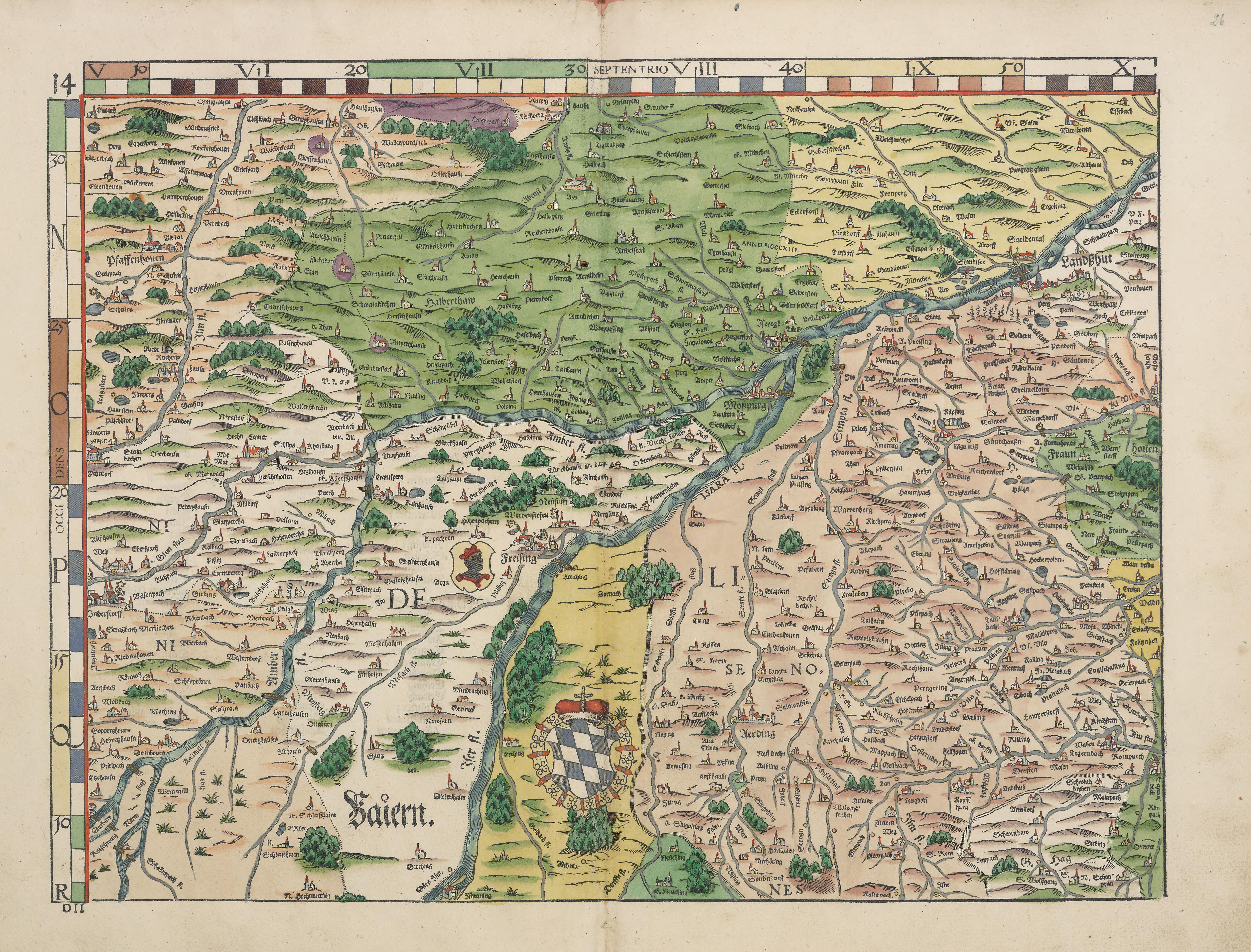 Philipp Apian - Bairische Landtafeln von 1568 (Tafel 14) ca. 1:140.000, Gesamtgröße des Originals 156 x 159 cm, je Blatt 43 x 33 cm Auf der Basis der „Großen Karte“ ließ Philipp Apian 1566 von Jost Amman Holzschnitte im kleineren Maßstab von 1:144.000 anfertigen. Diese so genannten Bairischen Landtafeln, aufgeteilt in 24 Holzschnitte, verlegte Apian in seiner eigenen Druckerei. Die Genauigkeit der Landkarten wurde erst im 19. Jahrhundert übertroffen. Noch Napoleon benutzte sie für den Einmarsch in Bayern. Ein Originaldruck der Karte ist im Stadtmuseum Ingolstadt ausgestellt, die Druckstöcke befinden sich heute im Bayerischen Nationalmuseum in München. Abraham Ortelius verbreitete kolorierte Kupferstiche dieser Landtafeln in Buchform „ex tabula Philippi Apiani“.